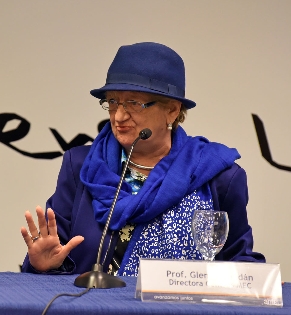 Glenda Rondán, directora de los Centros MEC, el 16 de agosto de 2016, durante la firma de convenio entre Antel y el Ministerio de Educación y Cultura para fortalecer los Centros MEC en Uruguay. Imagen recortada de la original